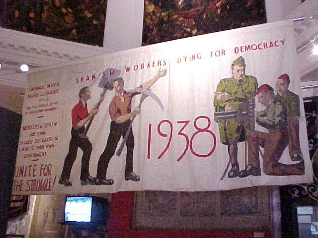 Mobilisierung für die Internationalen Brigaden der spanischen Republik 1938 People's Palace museum Glasgow/Scotland